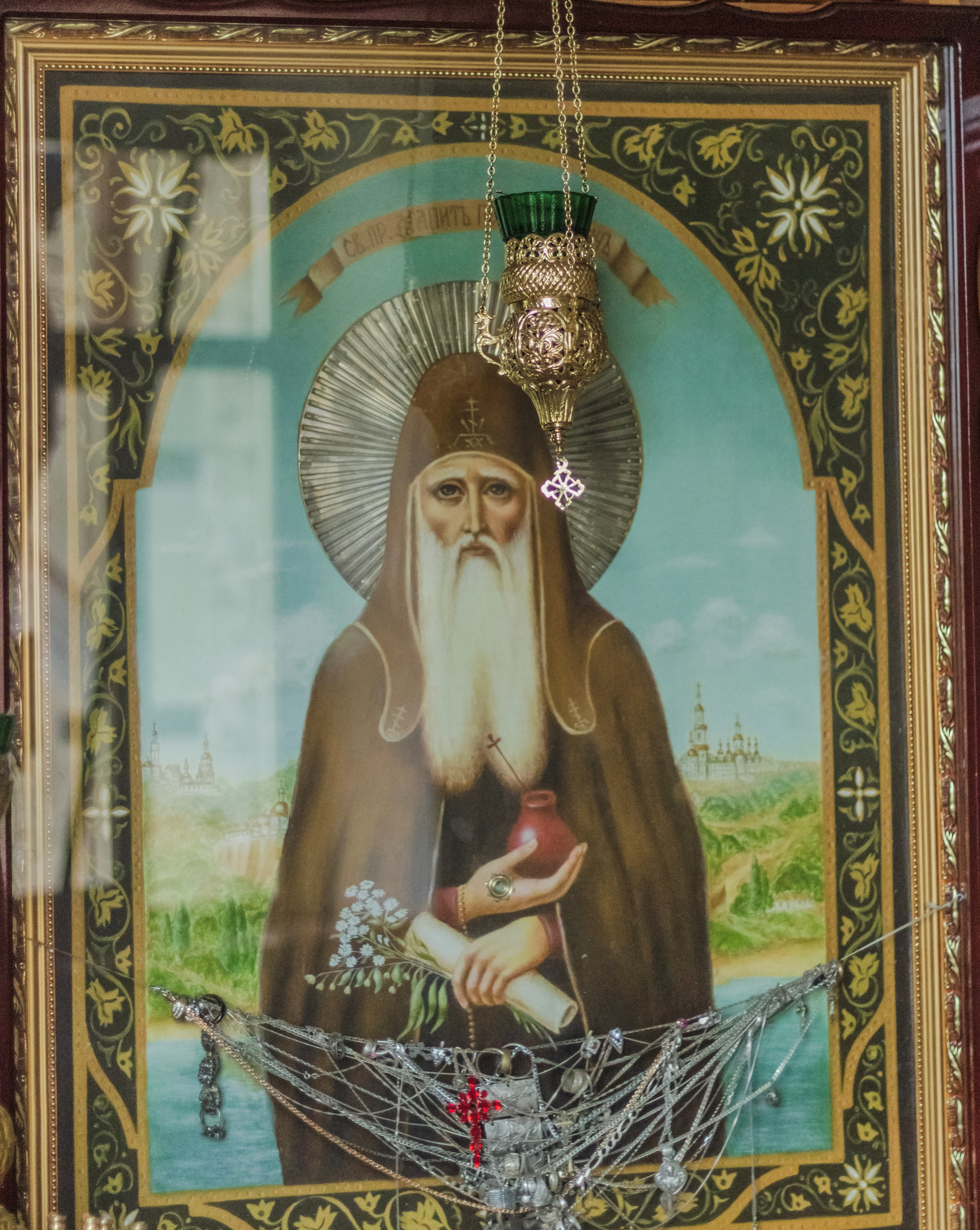 ікона